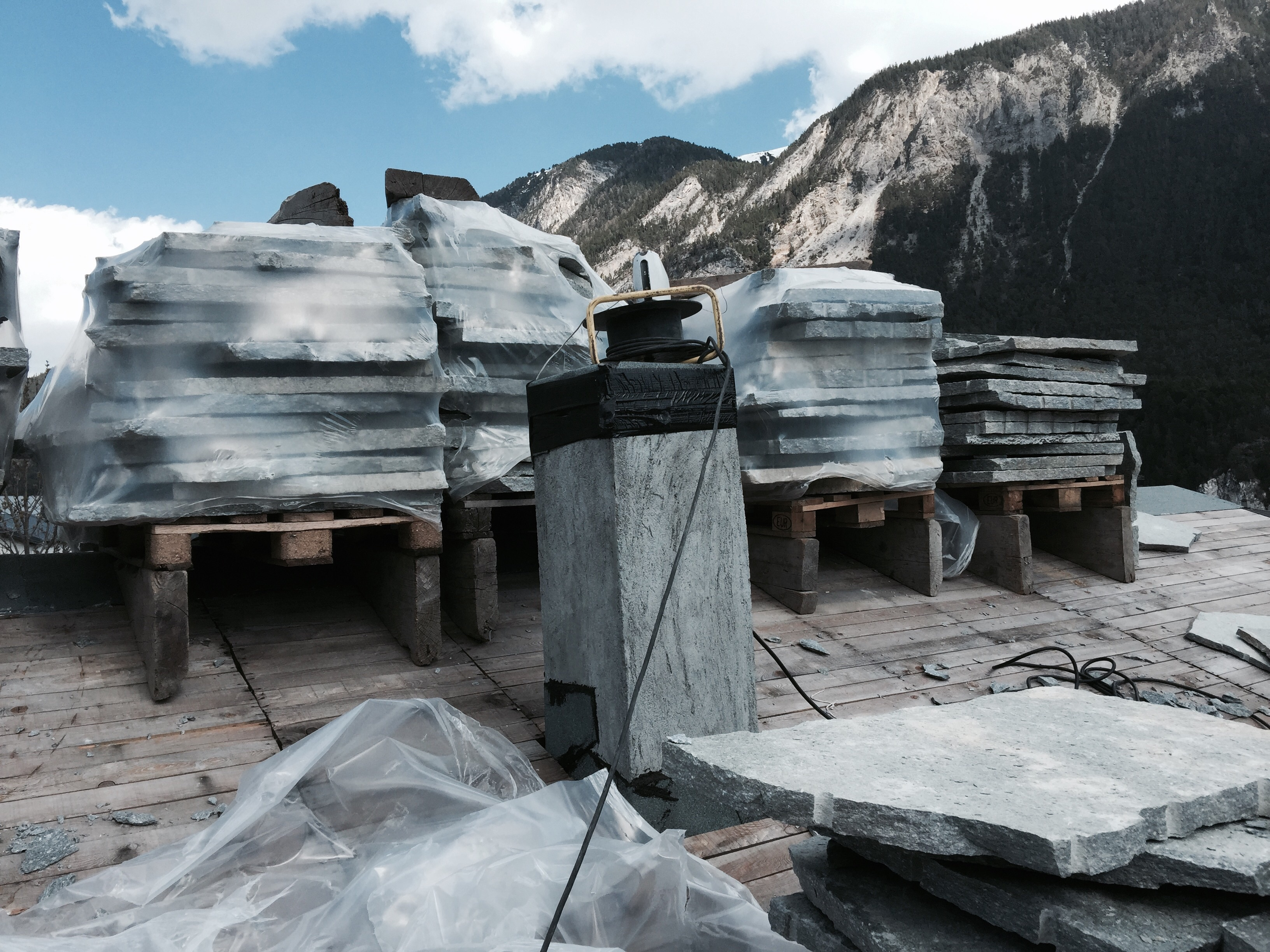 Préparation de la couverture d'un toit traditionnel en lauzes épaisses d'orthogneiss, dans la tradition savoyarde